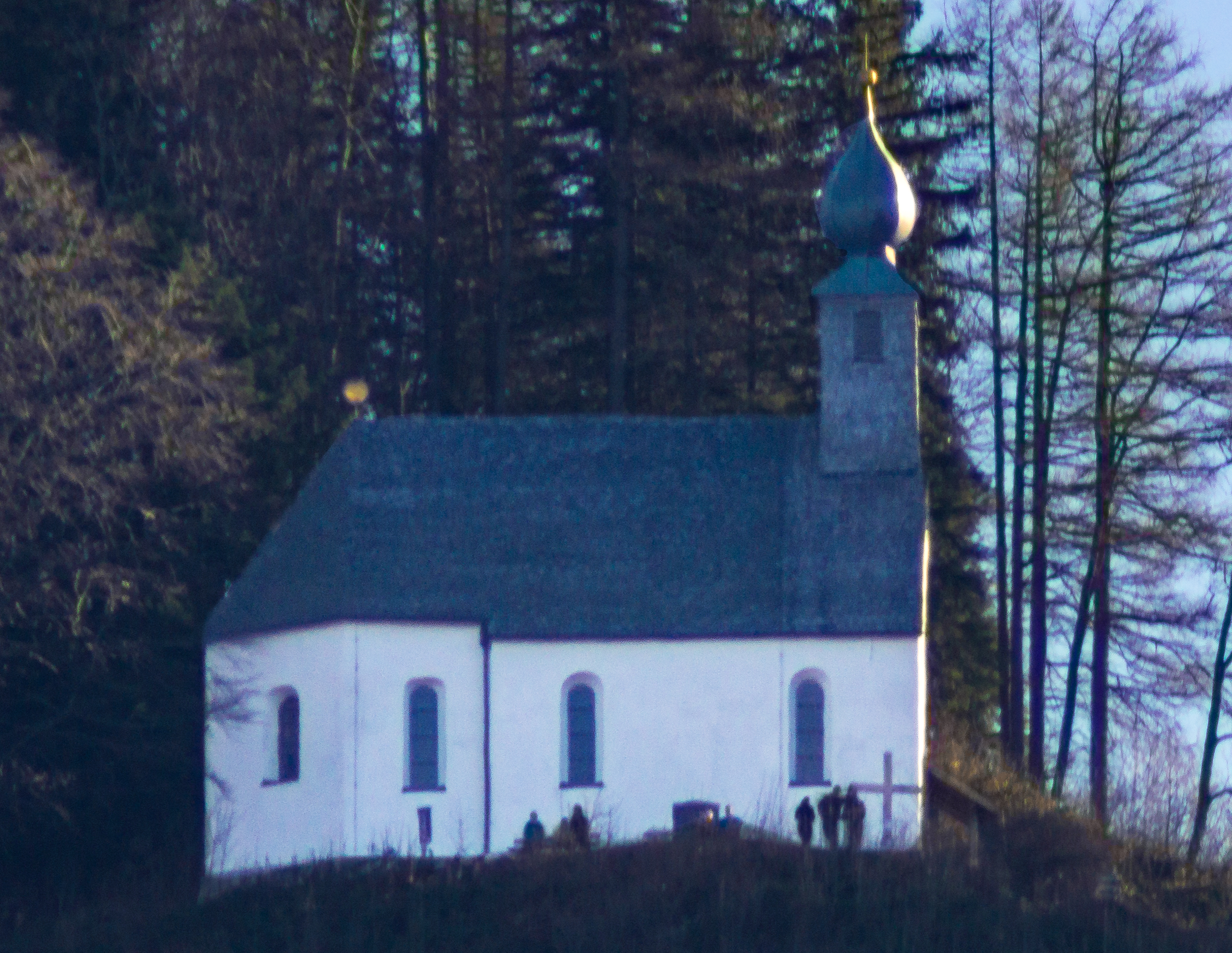 Die Schnappenkirche auf dem Schnappenberg in Marquartstein vom Grassauer Ortsteil Reifing aus.